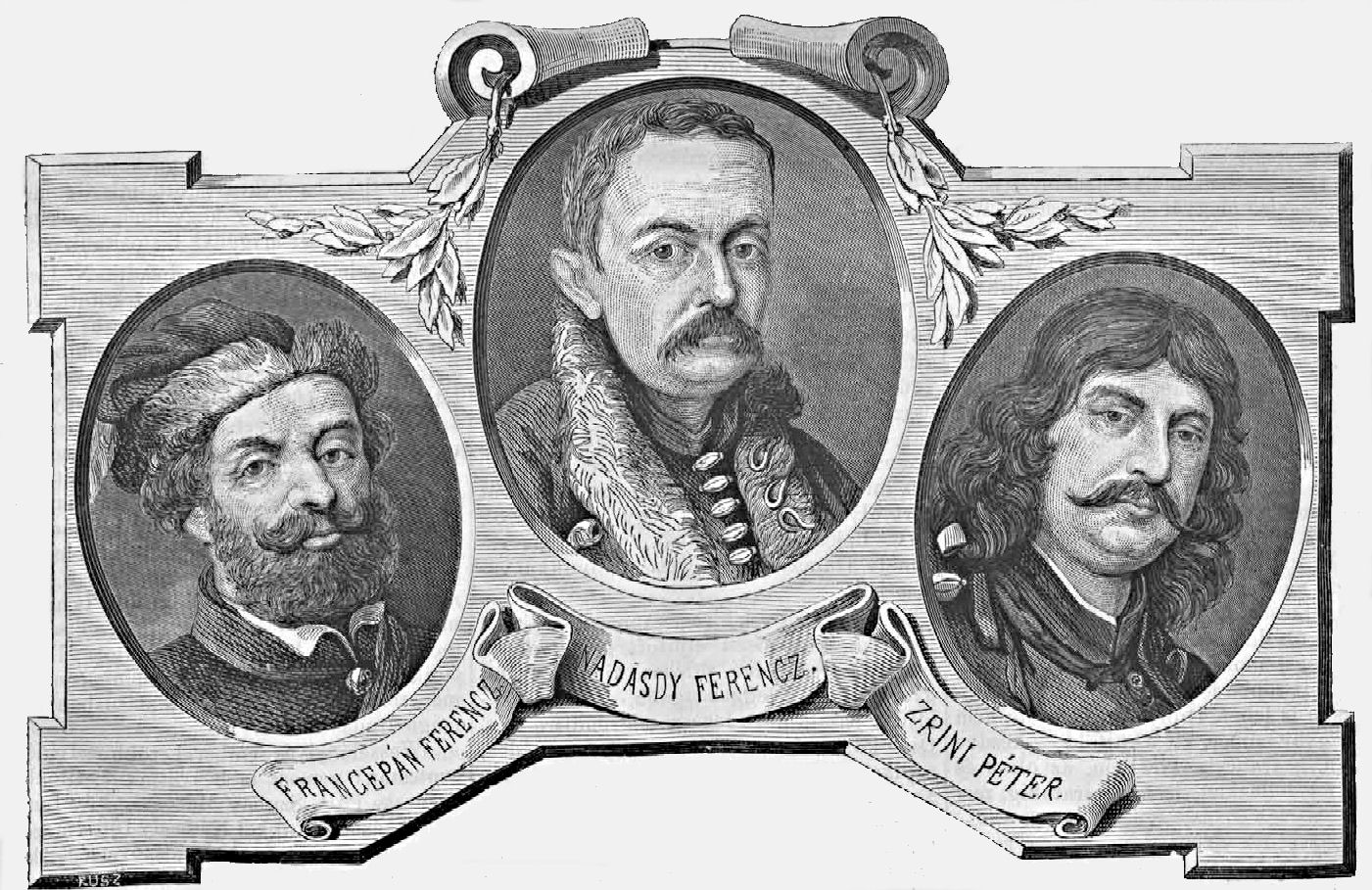 A Wesselényi összeesküvés 1671. április 30-án kivégzett vértanúi. Rusz Károly metszete (Vasárnapi Ujság, 1871. május 7.)